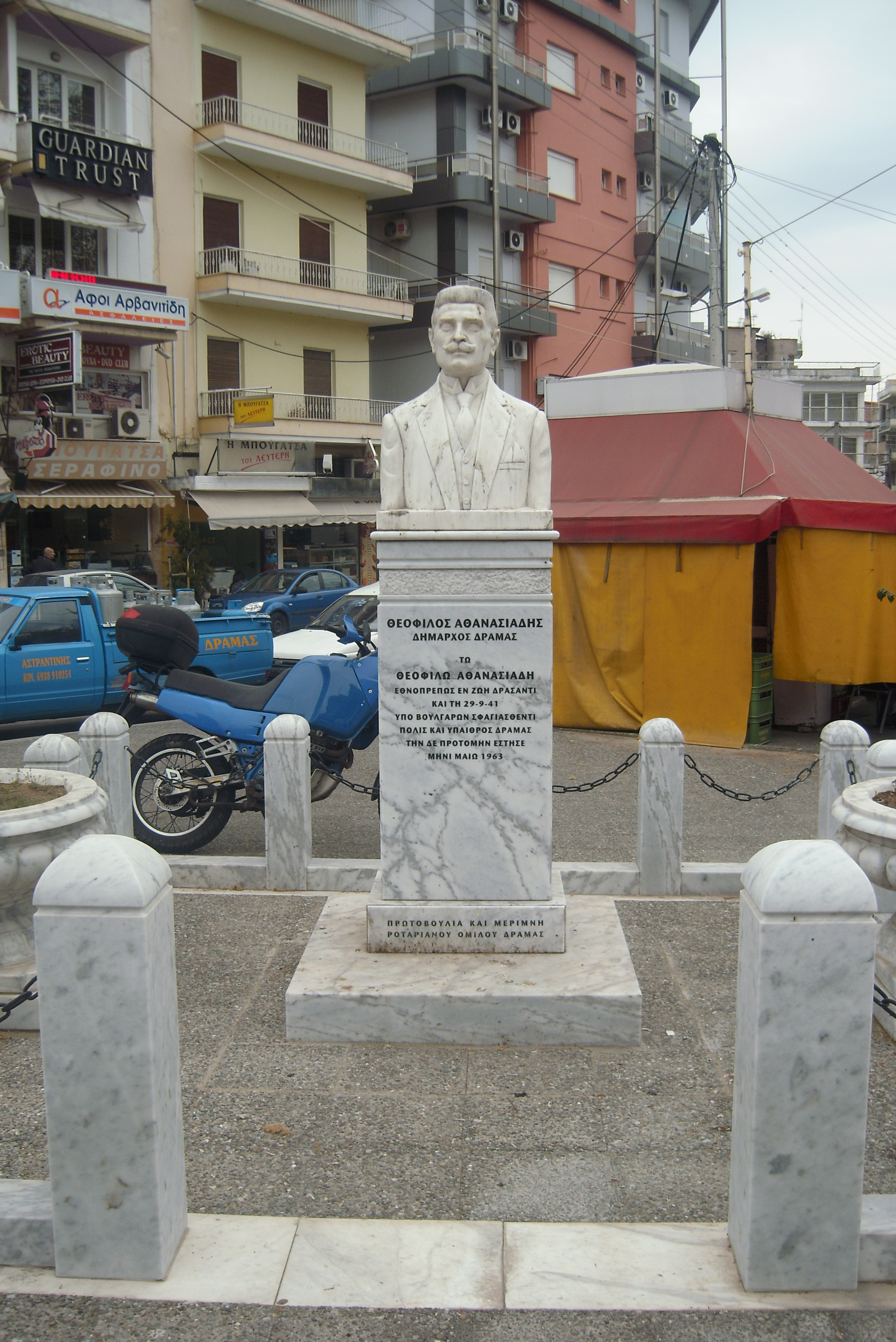 Паметник на Теофилос Атанасиадис в град Драма.